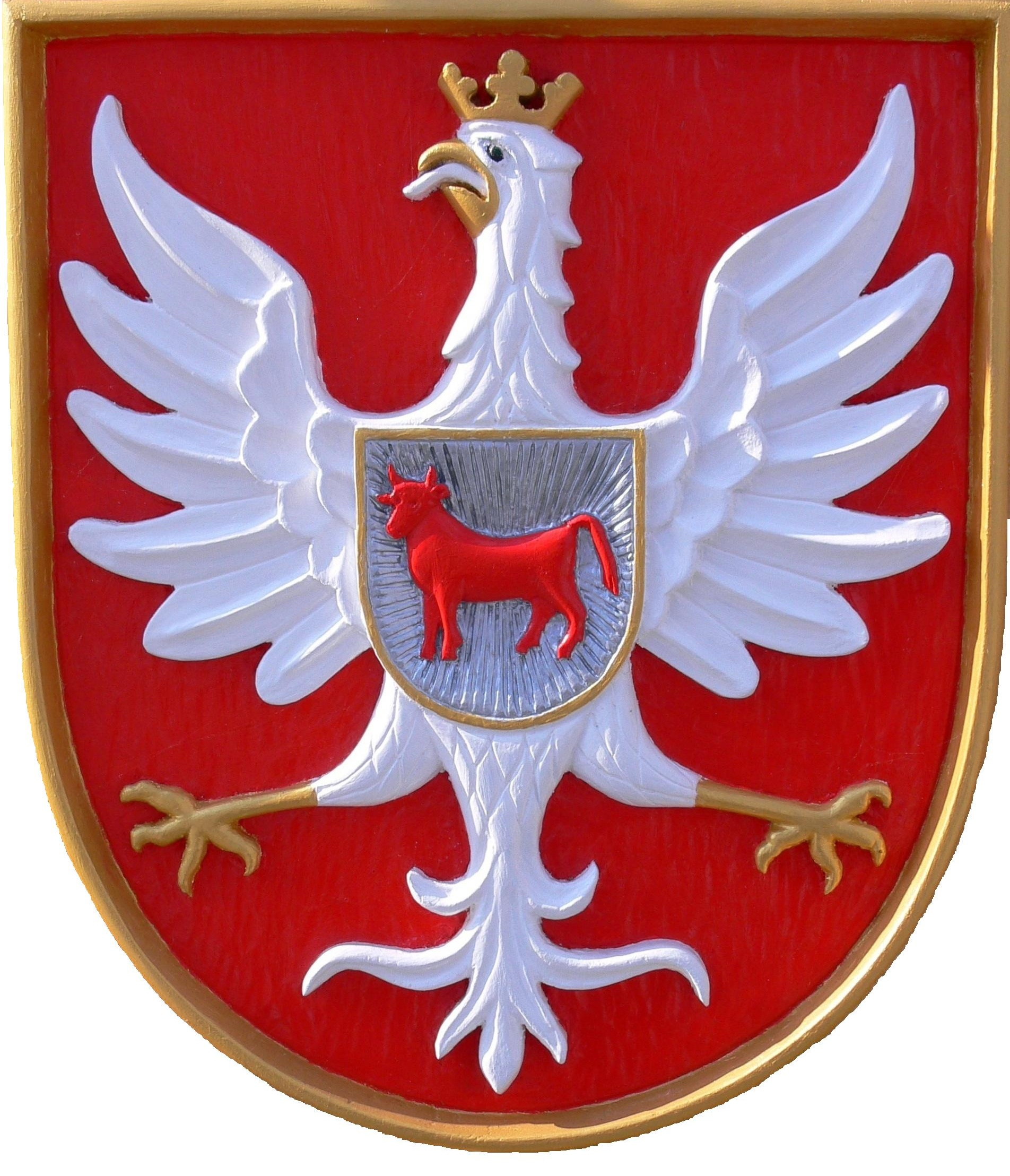 Herb Wartosławia / Nowego Mostu (Neubrück)